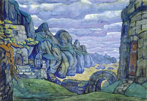 По заказу Московской частной оперы С.И. Зимина он создаёт (1912) около 30 эскизов декораций и костюмов для вагнеровской оперы "Тристан и Изольда".